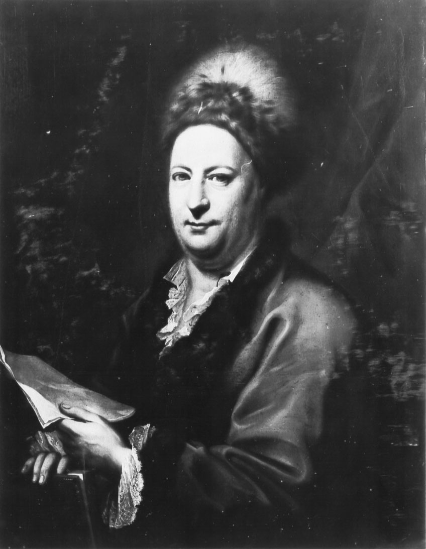 Smissen, Dominicus van der, Bildnis des Dichters Friedrich Hagedorn (1708-1754), Bild, Hamburg, Hamburger Kunsthalle, 41